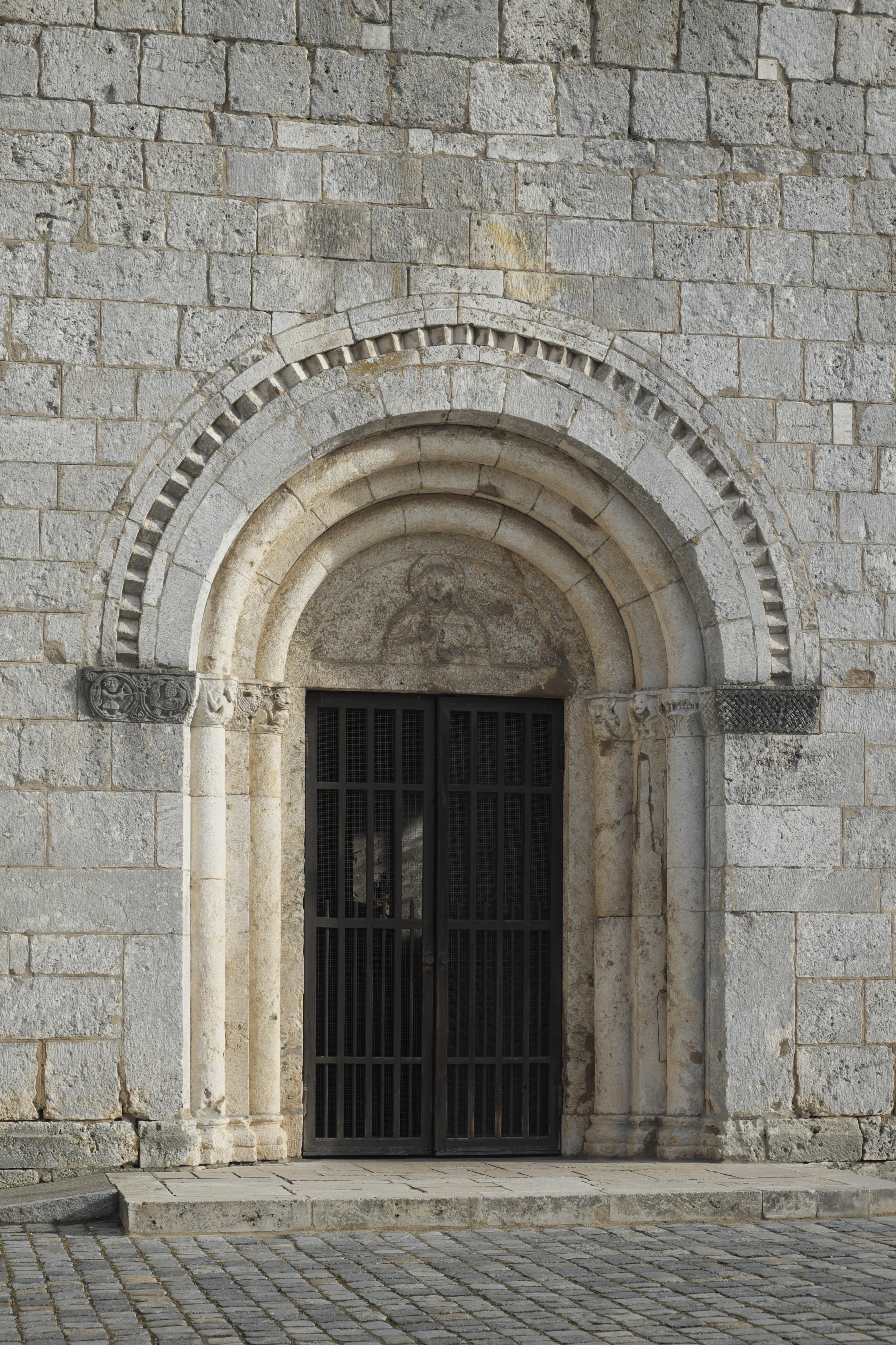 Katholische Pfarrkirche Maria Immaculata in Biburg im niederbayerischen Landkreis Kelheim (Bayern/Deutschland), romanisches Portal